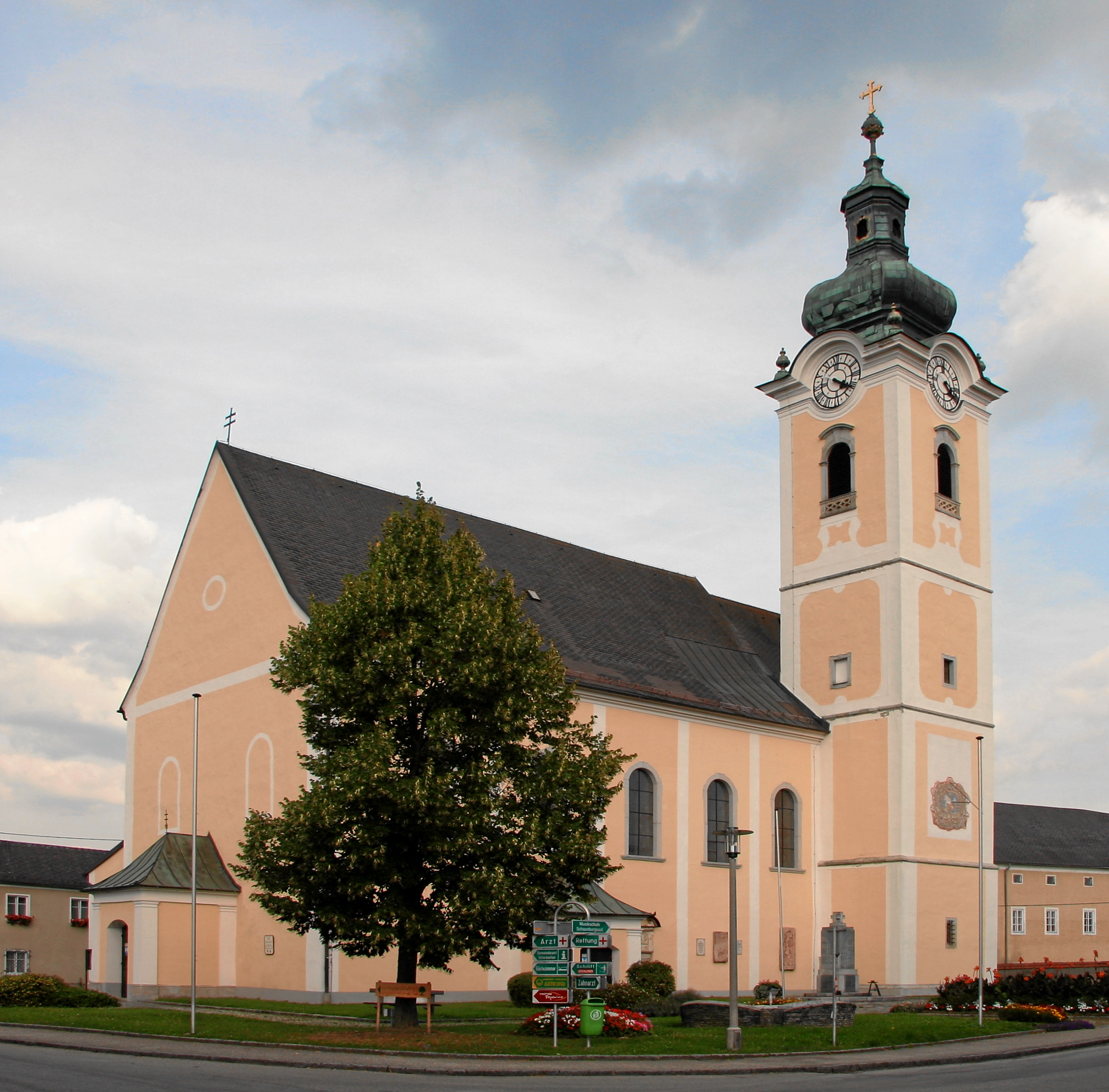 Pfarrkirche Hartkirchen